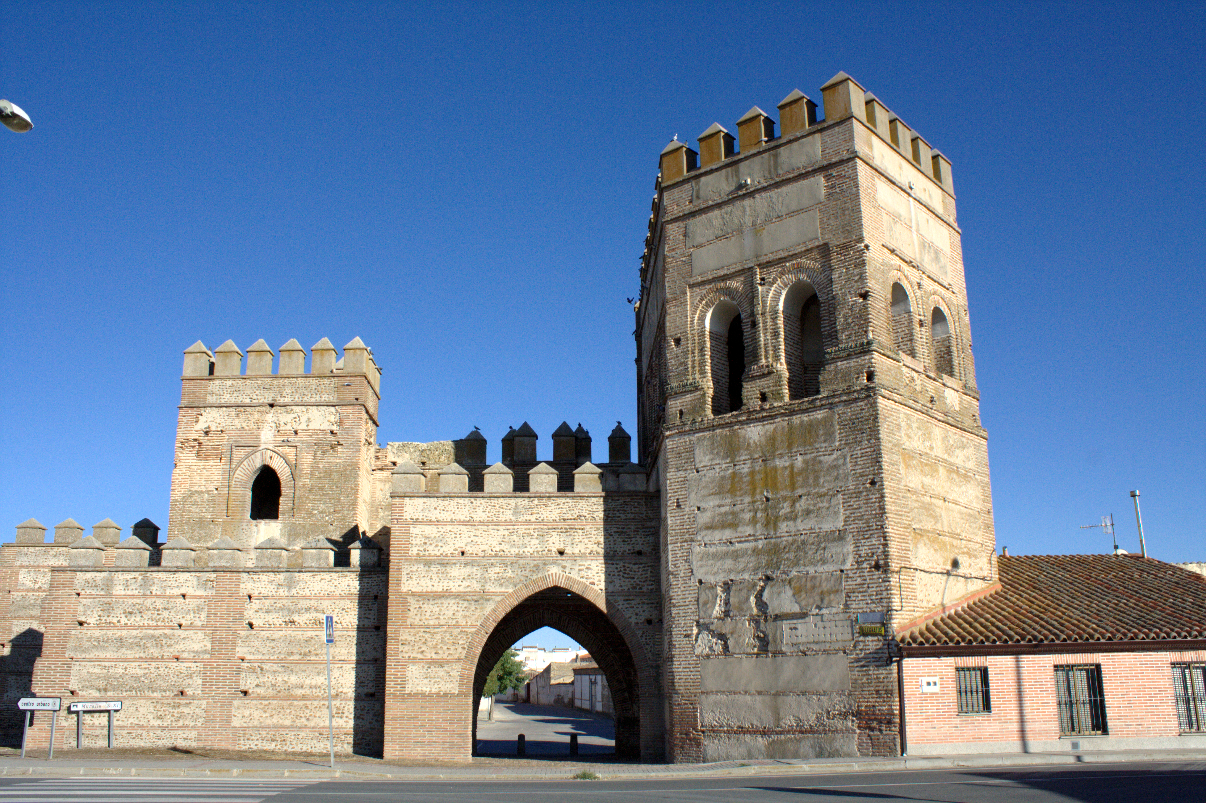 Puerta occidental del recinto amurallado de Madrigal de las Altas Torres